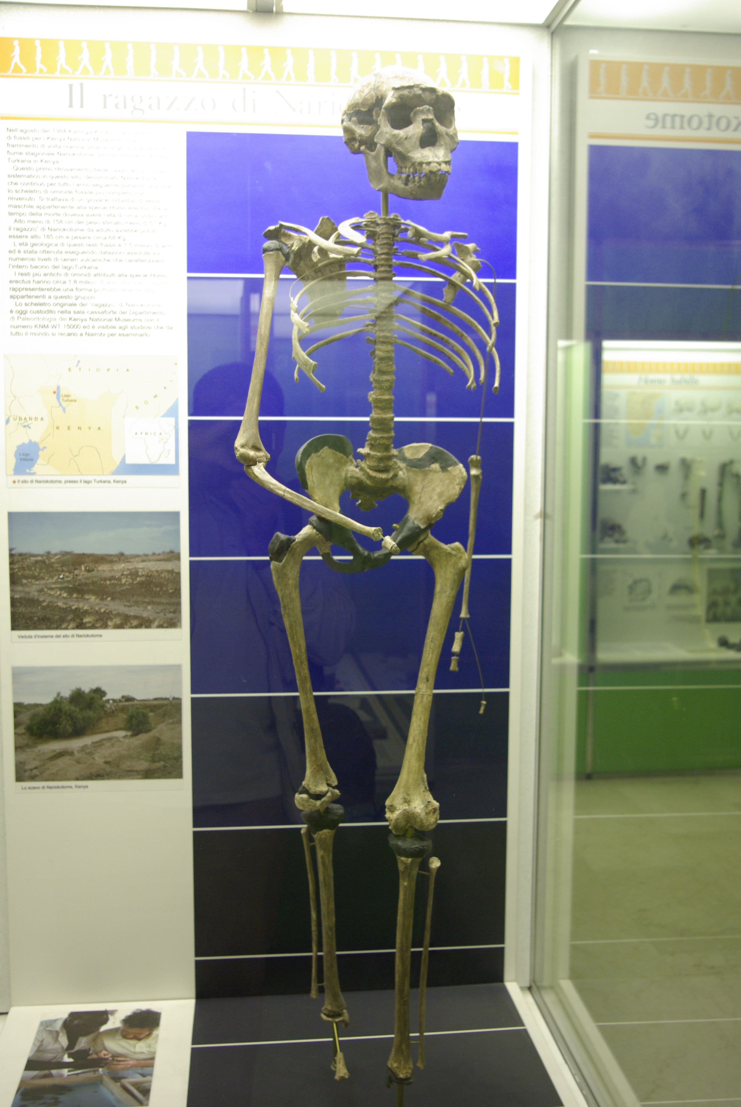 Museo civico di storia naturale This is a photo of a monument which is part of cultural heritage of Italy.